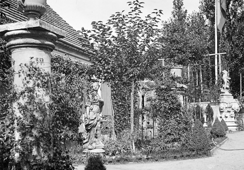 „Mein Gartengrundstück Ritzschkegrund, aufgenommen 1894“. Fotografiert von Donadini, 1894